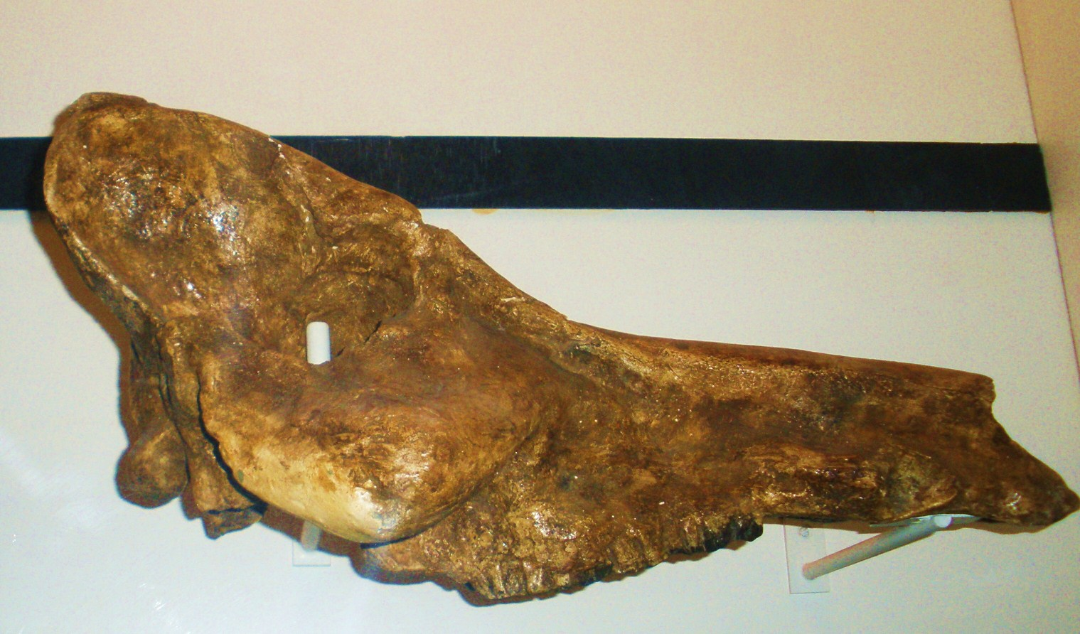 Fossil of Kolpochoerus heseloni - syn: Kolpochoerus limnetes, an extinct mammal -- Took the photo at Natural History Museum, London